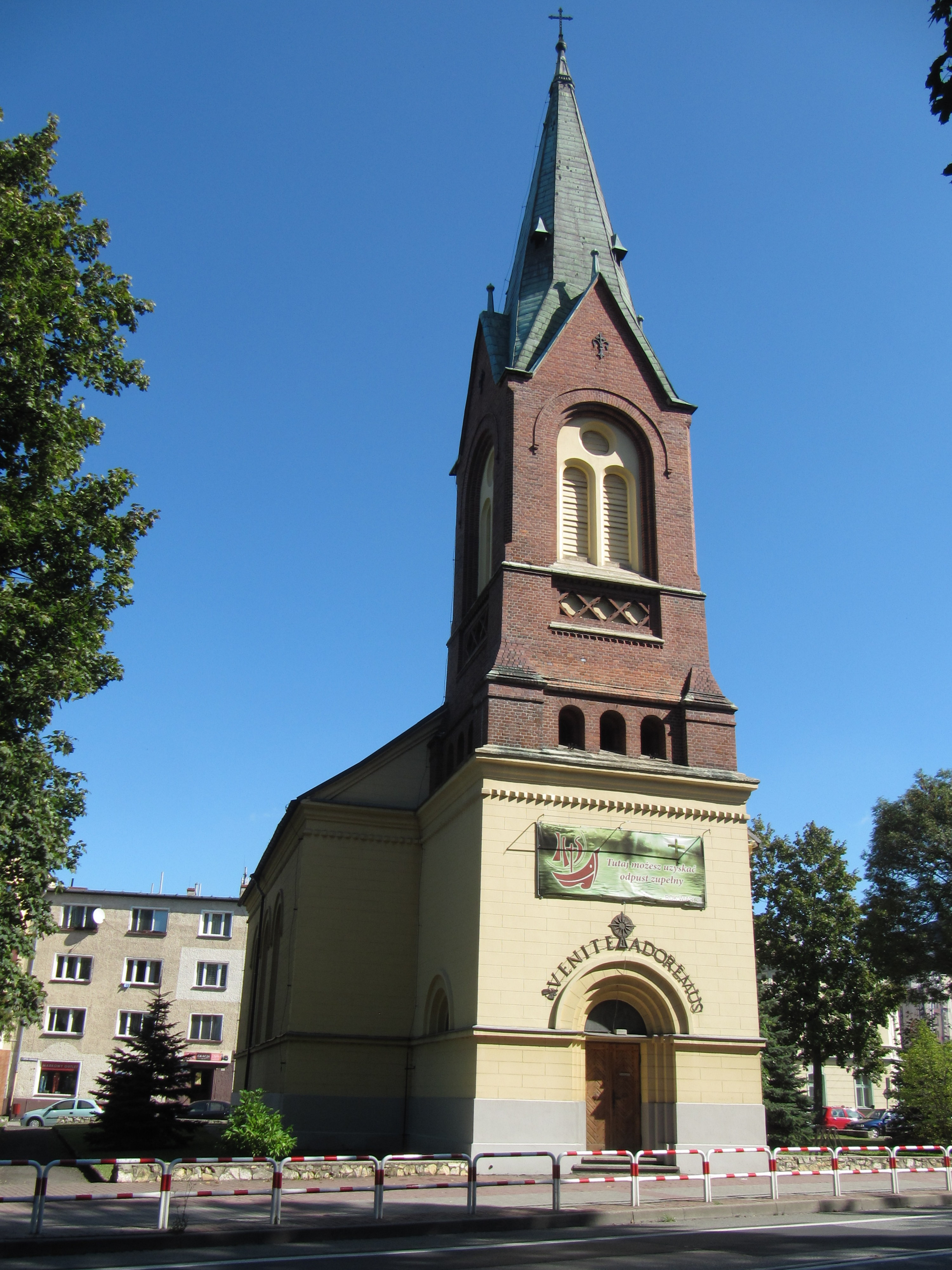 Strzelce Opolskie, kościół ewangelicki, ob. rzym.-kat. pw. Bożego Ciała, 1825, 1888